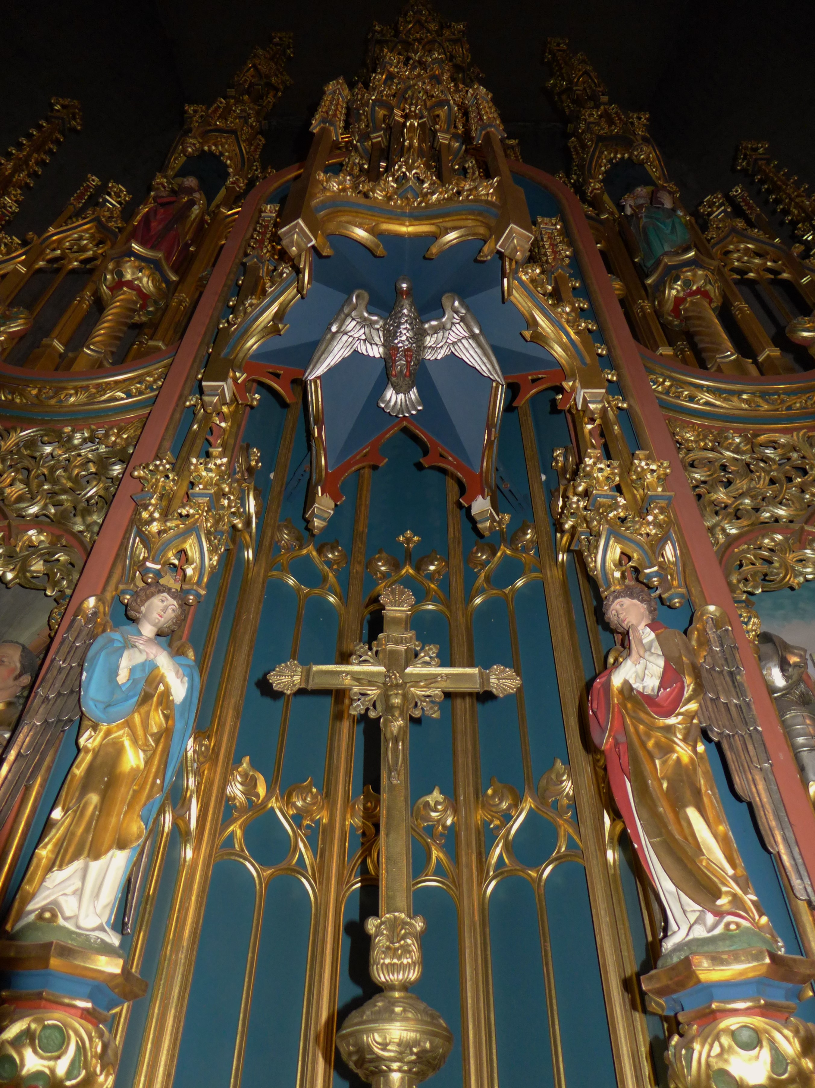 St. Ludwig (Saarlouis), Expositoriumsnische